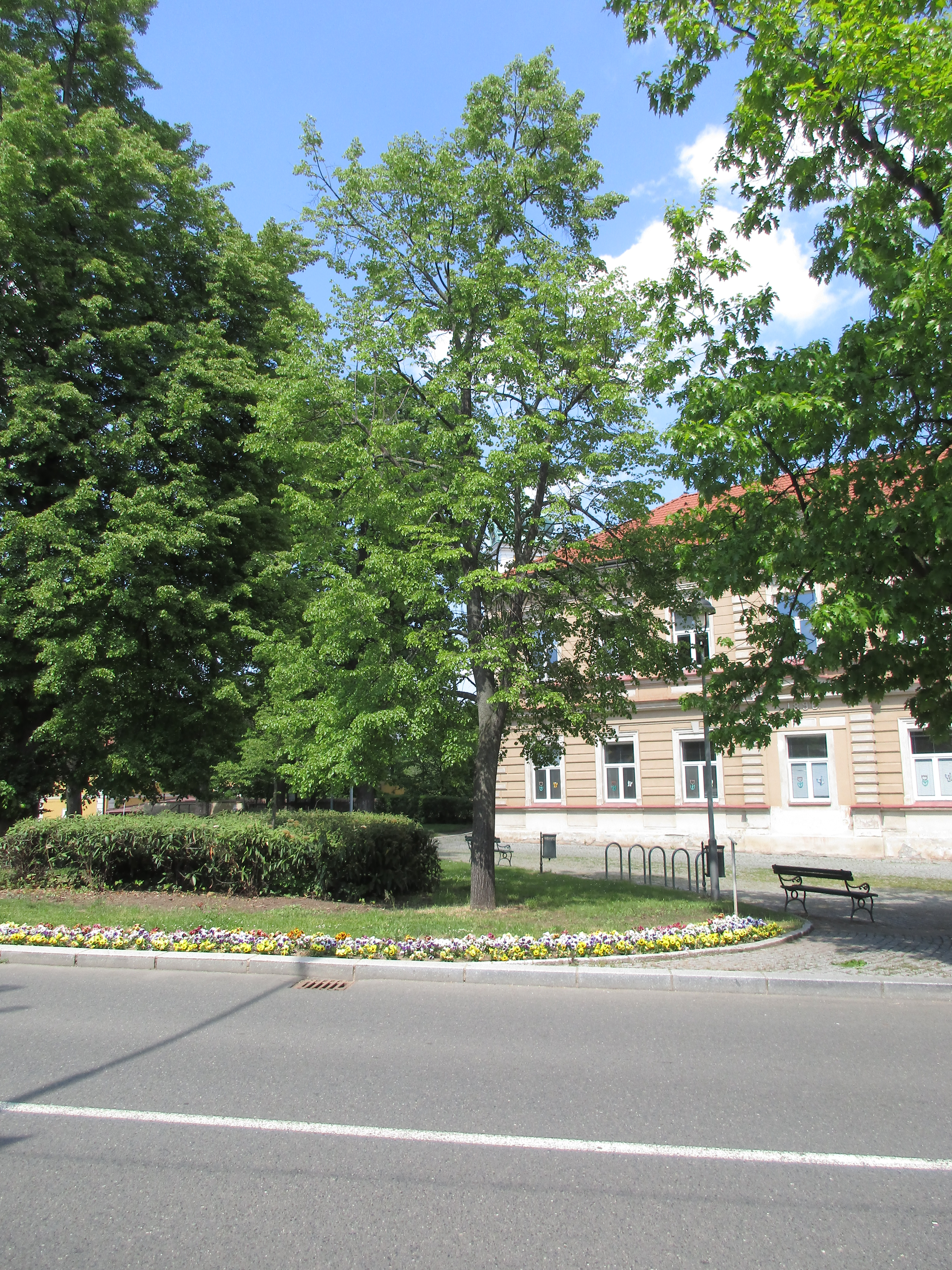 Lípa malolistá (Tilia cordata). Praha 9 - Vinoř, Vinořské náměstí. Vysazena 28. října 1968 na památku 50. výročí vzniku Československé republiky. Významný strom, evidenční číslo MHMP: 42, v databázi od roku 2014.